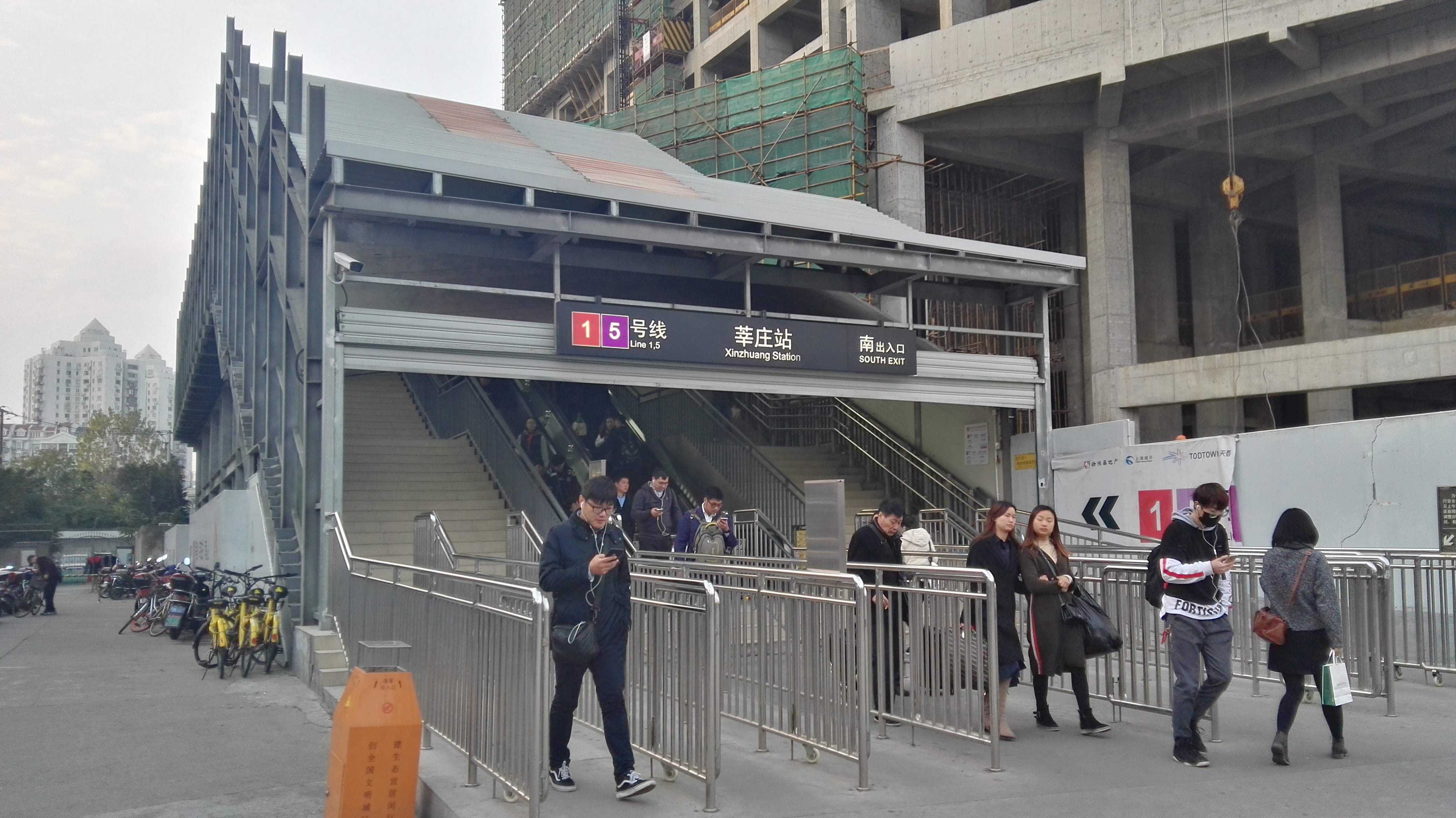 中文（中国大陆）: 莘庄地铁站南临时出口